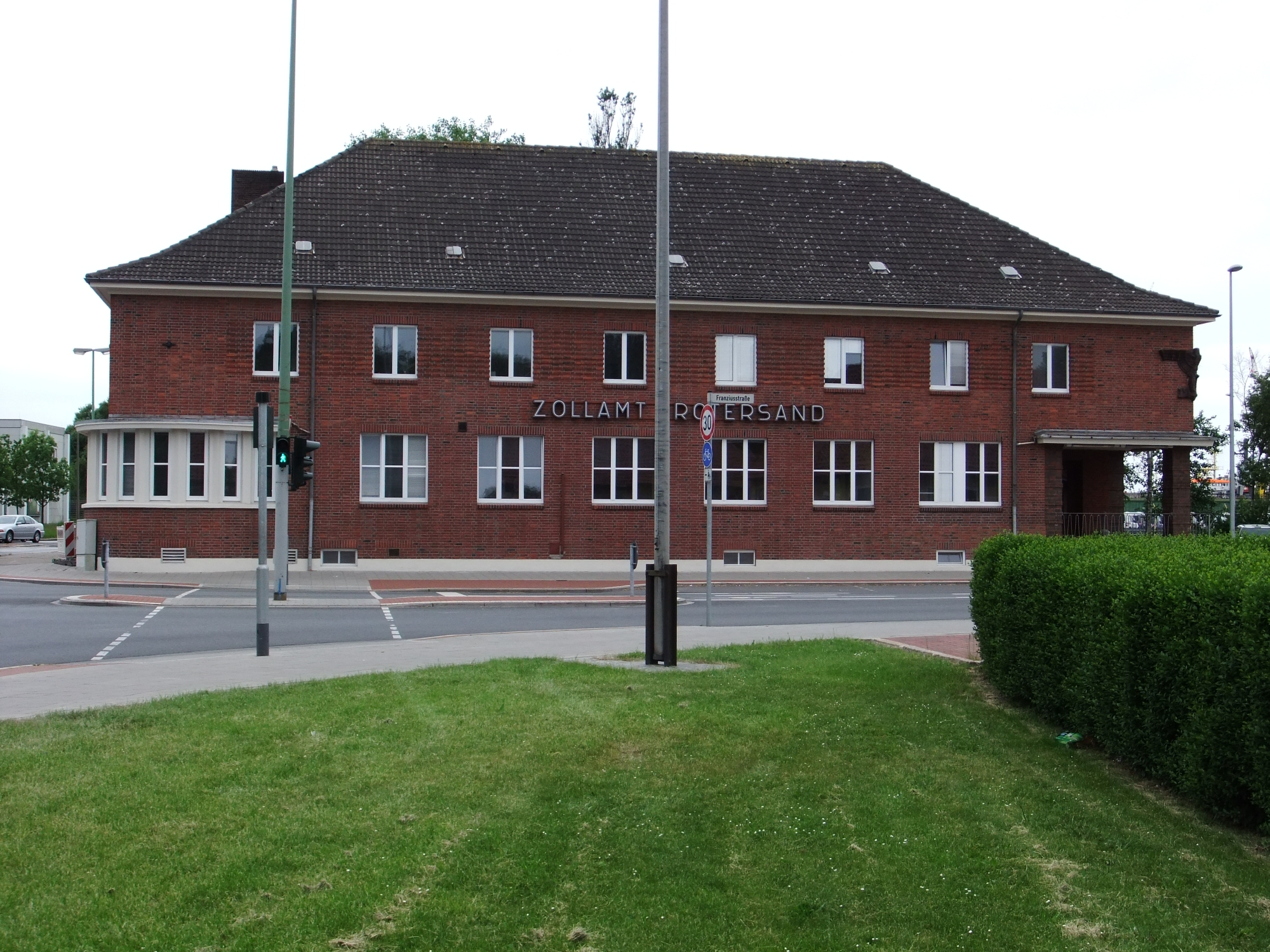 Zollamt Rotersand in Bremerhaven, Franziusstraße 1 .Das abgebildete Objekt ist ein geschütztes Kulturdenkmal in der Freien Hansestadt Bremen, mit der Nr. 3025 beim Landesamt für Denkmalpflege registriert.